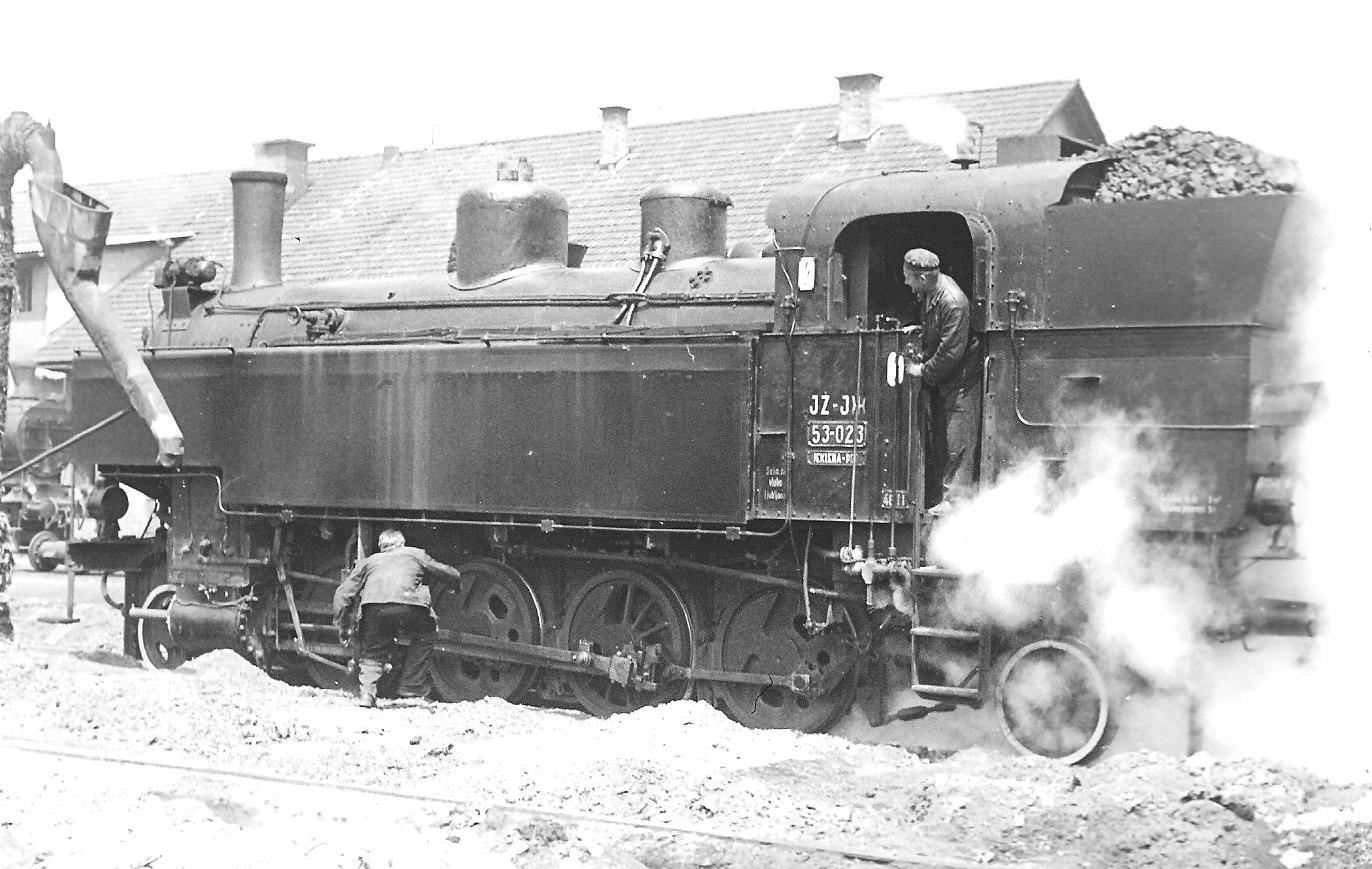 Tenderlok BR 53-023 der JZ